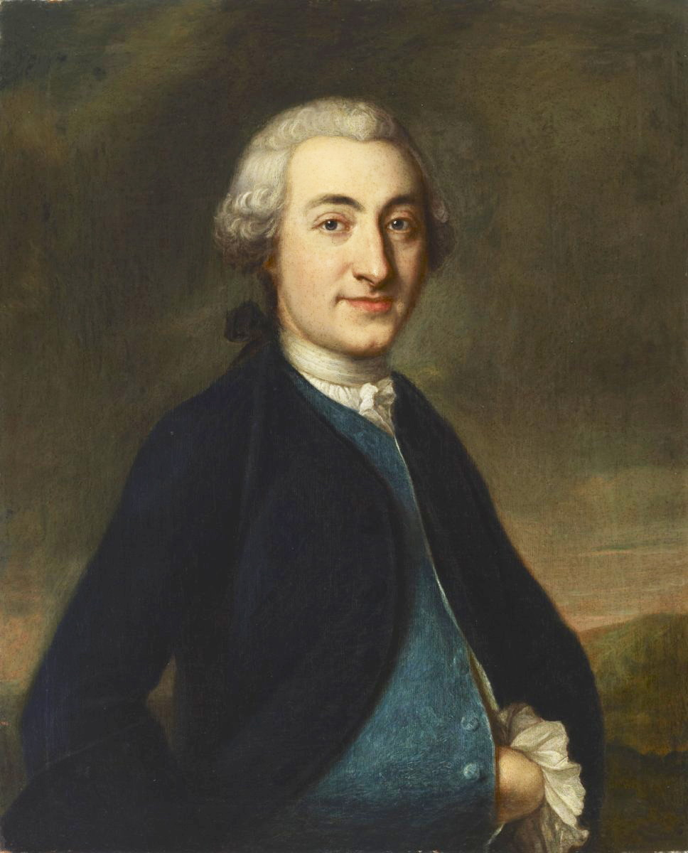 Jakob Westin den äldre, garvareålderman